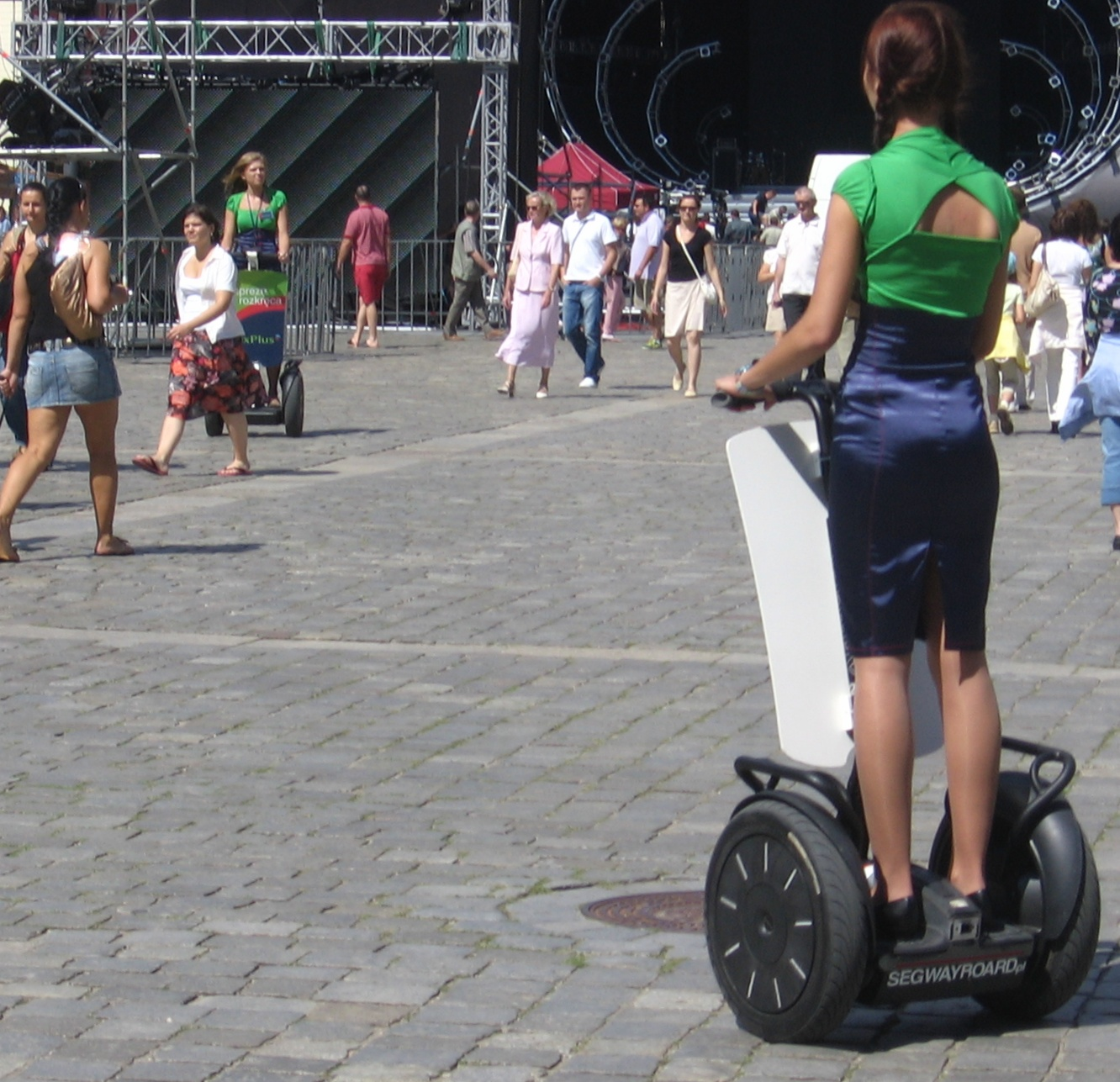 Segways